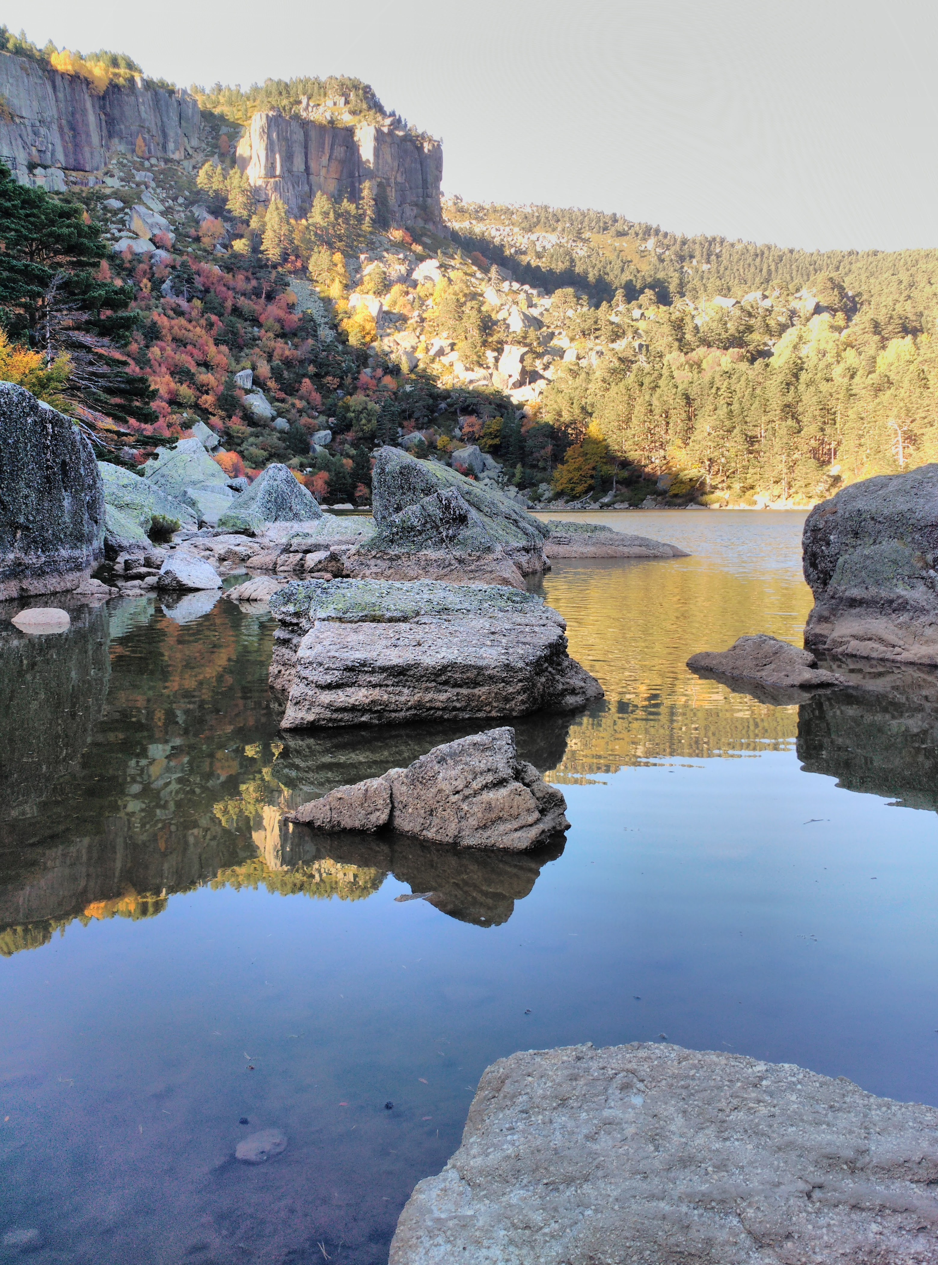 Laguna Negra de Urbión desde su lateral meridional (10-10-15), enla foto podemos ver reflejado en la laguna el paisaje otoñal de la zona.